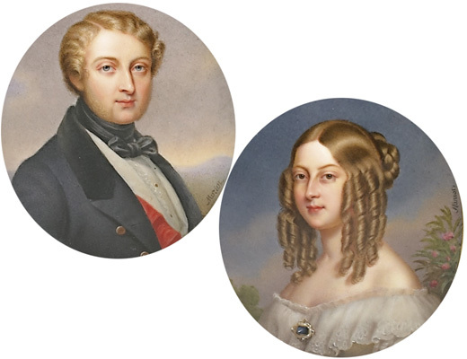 Viktoria von Sachsen-Coburg-Saalfeld-Koháry mit ihrem Mann